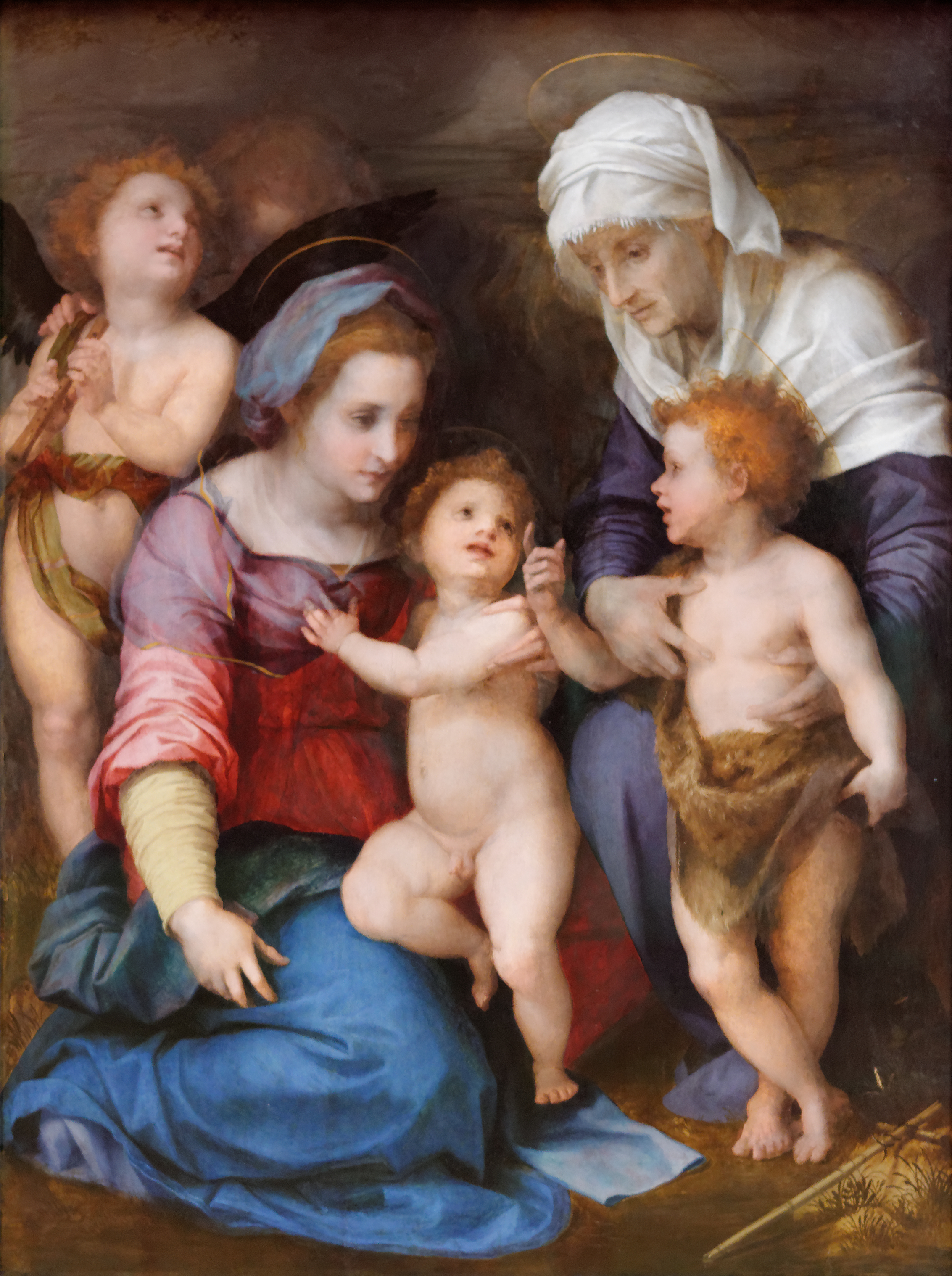 Madonna col bambino, san giovannino, S.elisabetta e un angelo Andrea del Sarto